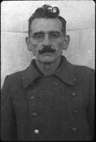 Johann Viktor Kirsch (* 15. Februar 1891; † 28. Mai 1946 in Landsberg am Lech) war SS-Hauptscharführer und als Lagerleiter von Außenlagern des KZ Dachau eingesetzt. Kirsch wurde im Dachau-Haup tprozess zum Tode verurteilt und hingerichtet.